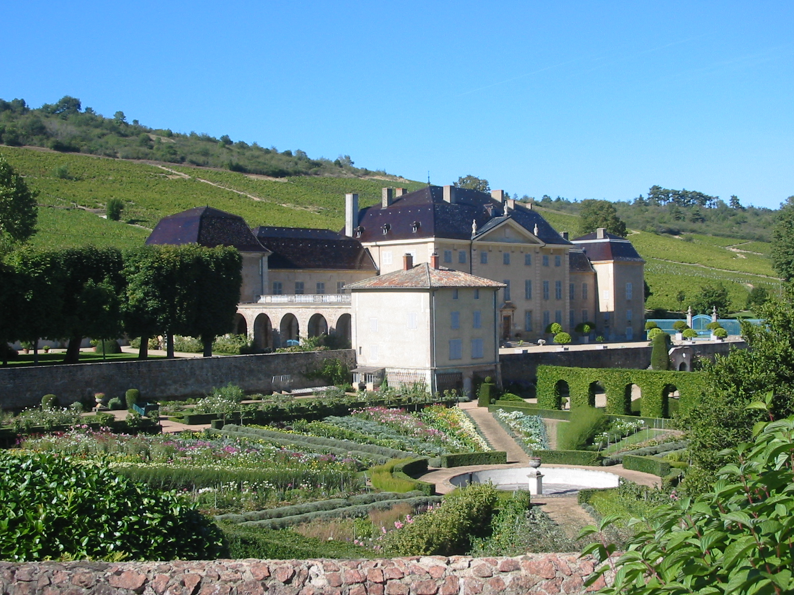 Château de la Chaize et le potager